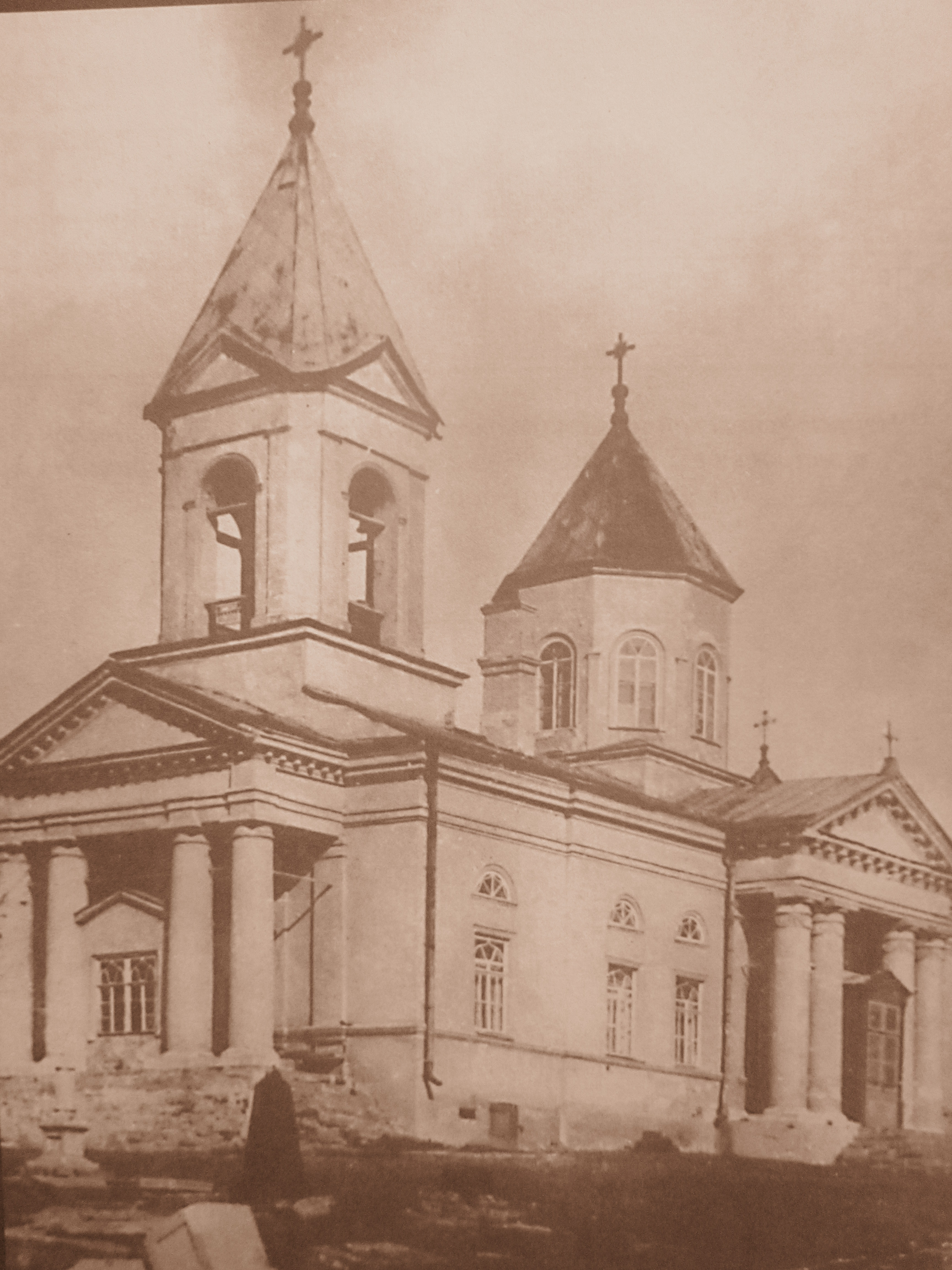 Армянская Никольская церковь (Сурб-Никогос). Нахичевань-на-Дону.